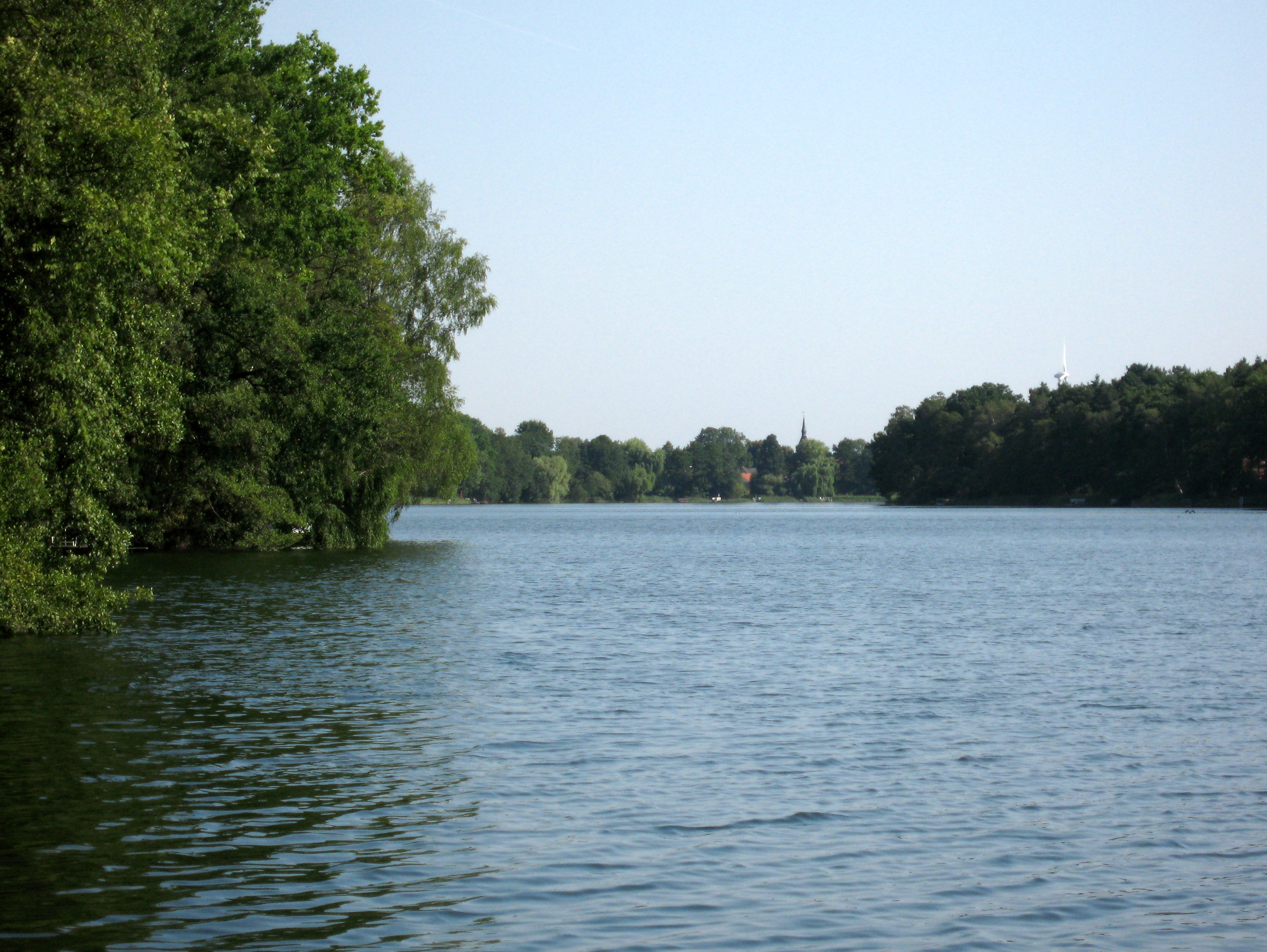 Stolzenhagener See im Ort Stolzenhagen in der Gemeinde Wandlitz, Landkreis Barnim, Land Brandenburg, Deutschland